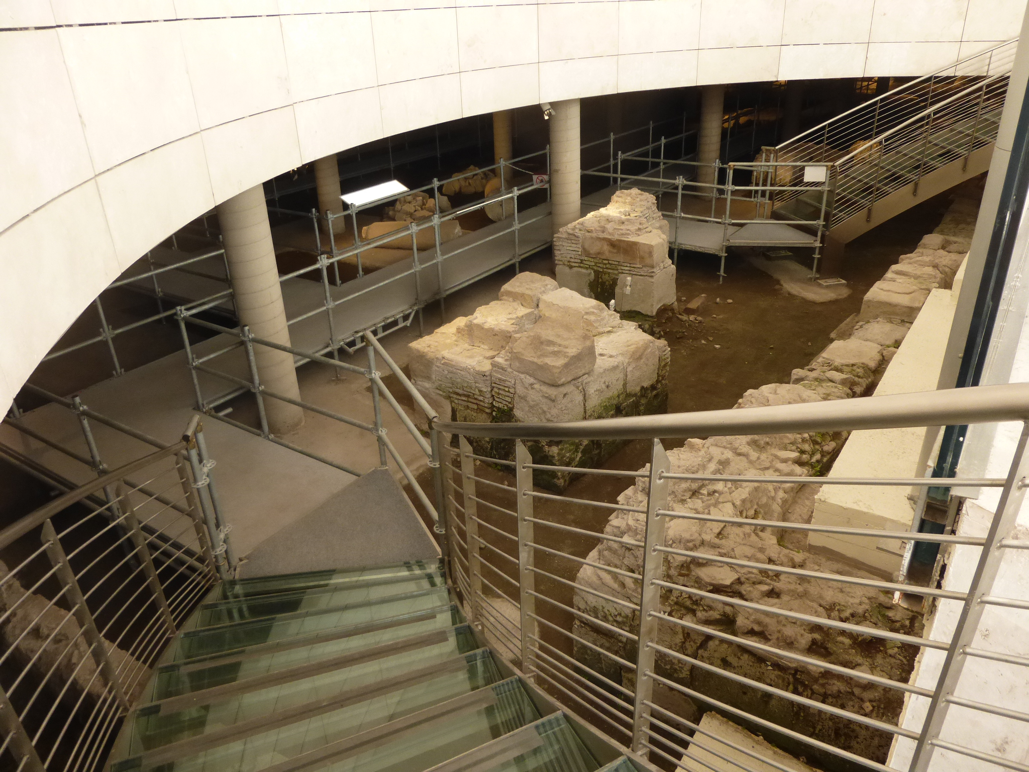 Roma, S. Paolo fuori le mura, area archeologica. Ingresso.